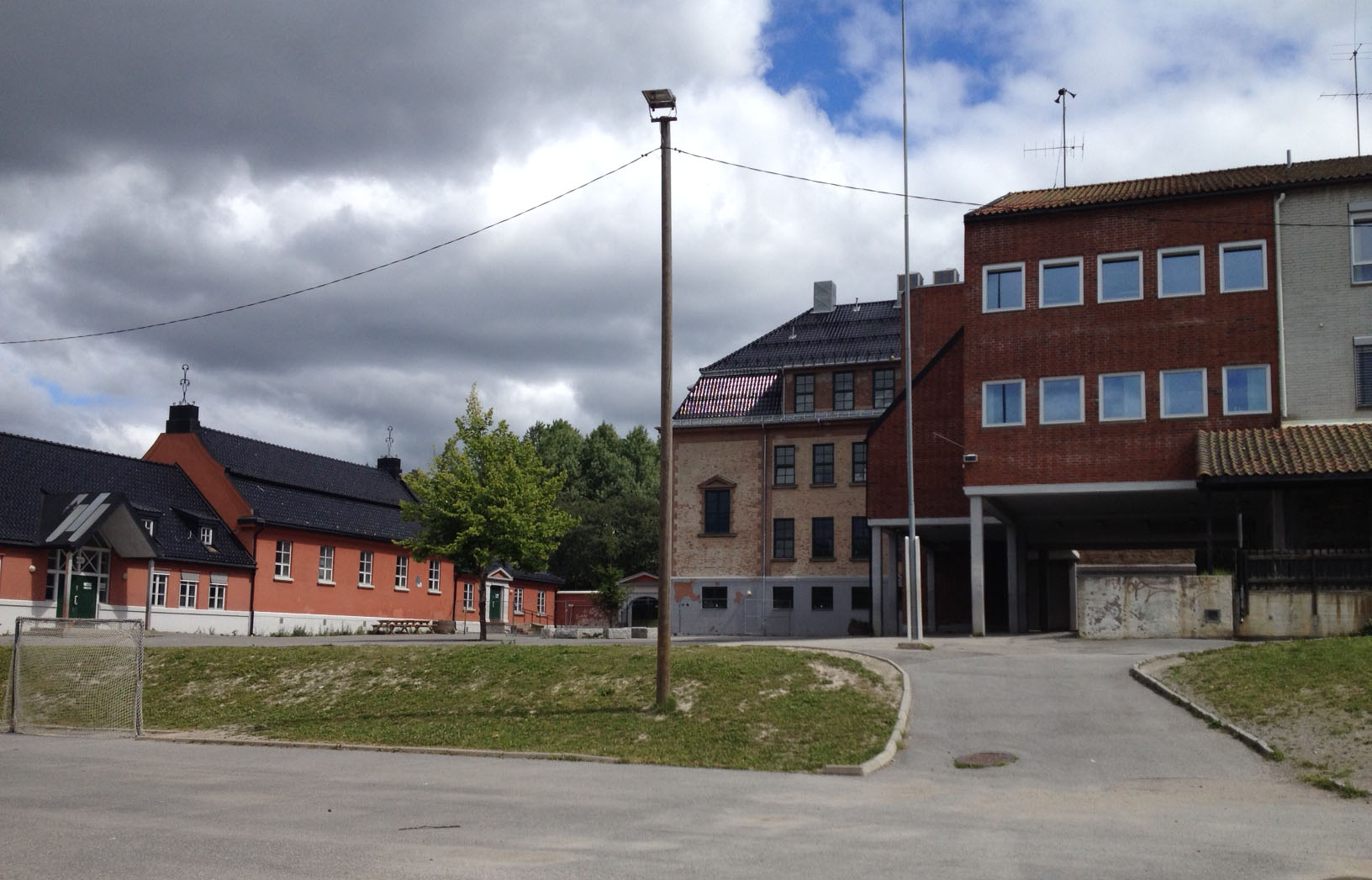 Greverud skole, Oppegård